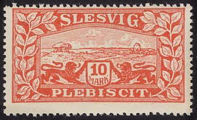 Плебисцитная почтовая марка Шлезвига, 1920 год